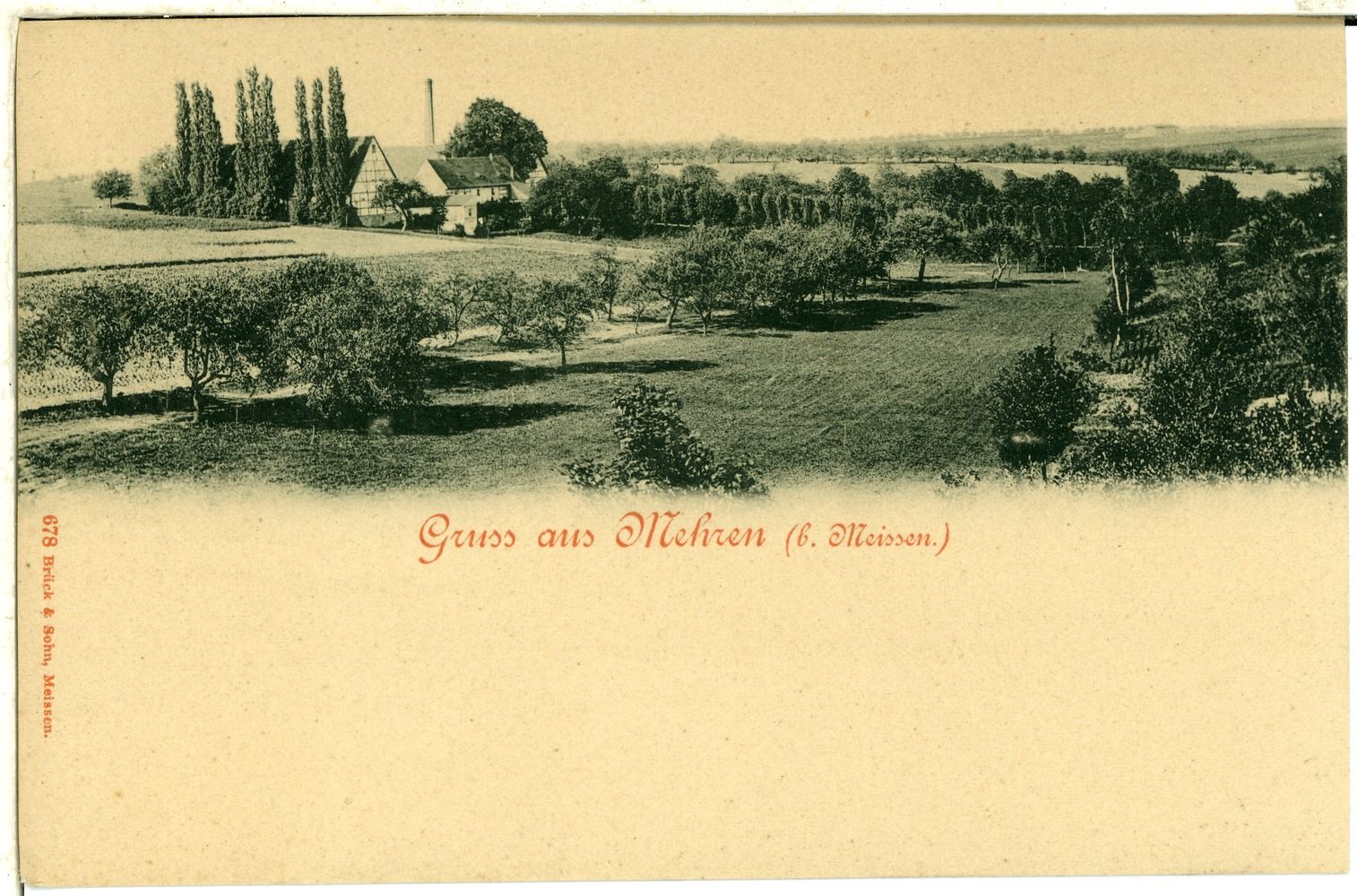 Mehren; Diese Ansichtskarte stammt vom Kunstverlag Brück & Sohn aus Meißen ( Die Karte hat die eindeutige Nummer 00678 und ist in höherer Auflösung beim Verlag erhältlich. Sie wurde im Rahmen einer Kooperation zwischen Wikipedianern und dem Kunstverlag für Wikimedia Commons zur Verfügung gestellt.